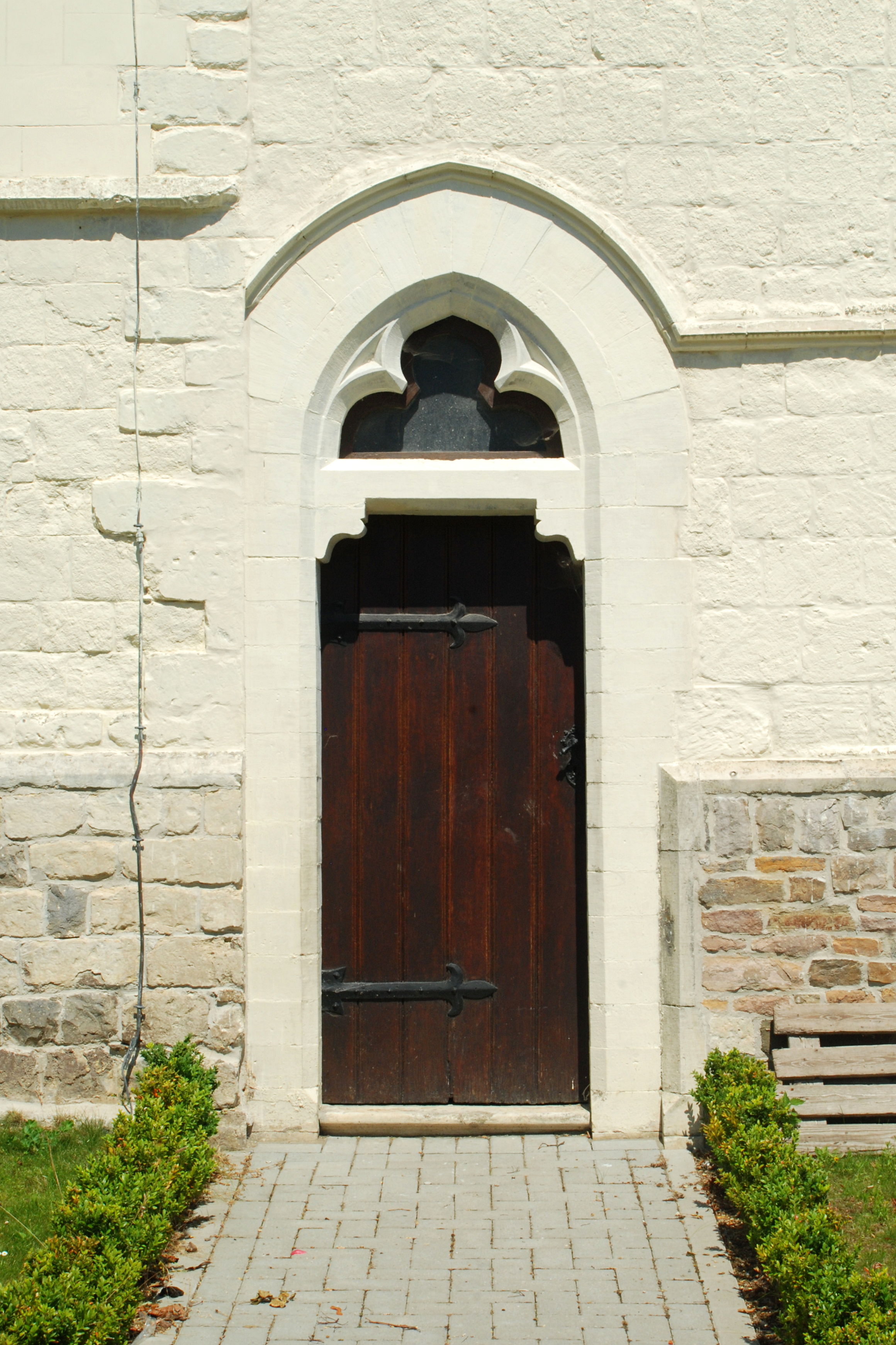 Belgique - Brabant wallon - Lincent - Église Saint-Christophe de Racour